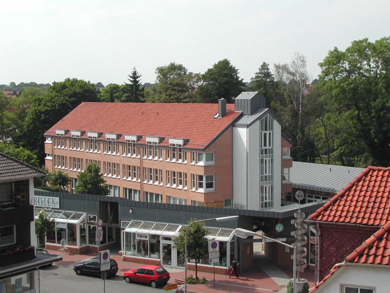 Rathaus der Gemeinde Wennigsen (Deister)